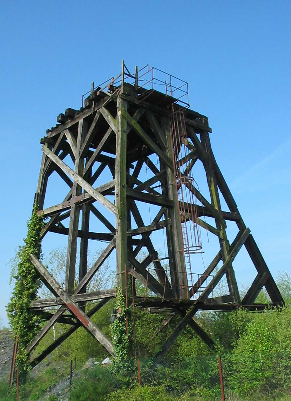 Ancien chevalement en bois, ardoisières de la Pouèze (49)